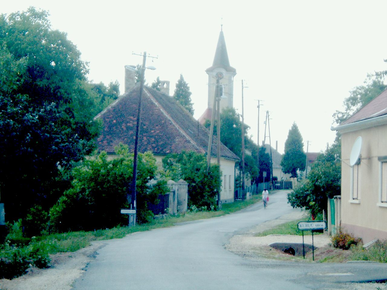 Gasztony